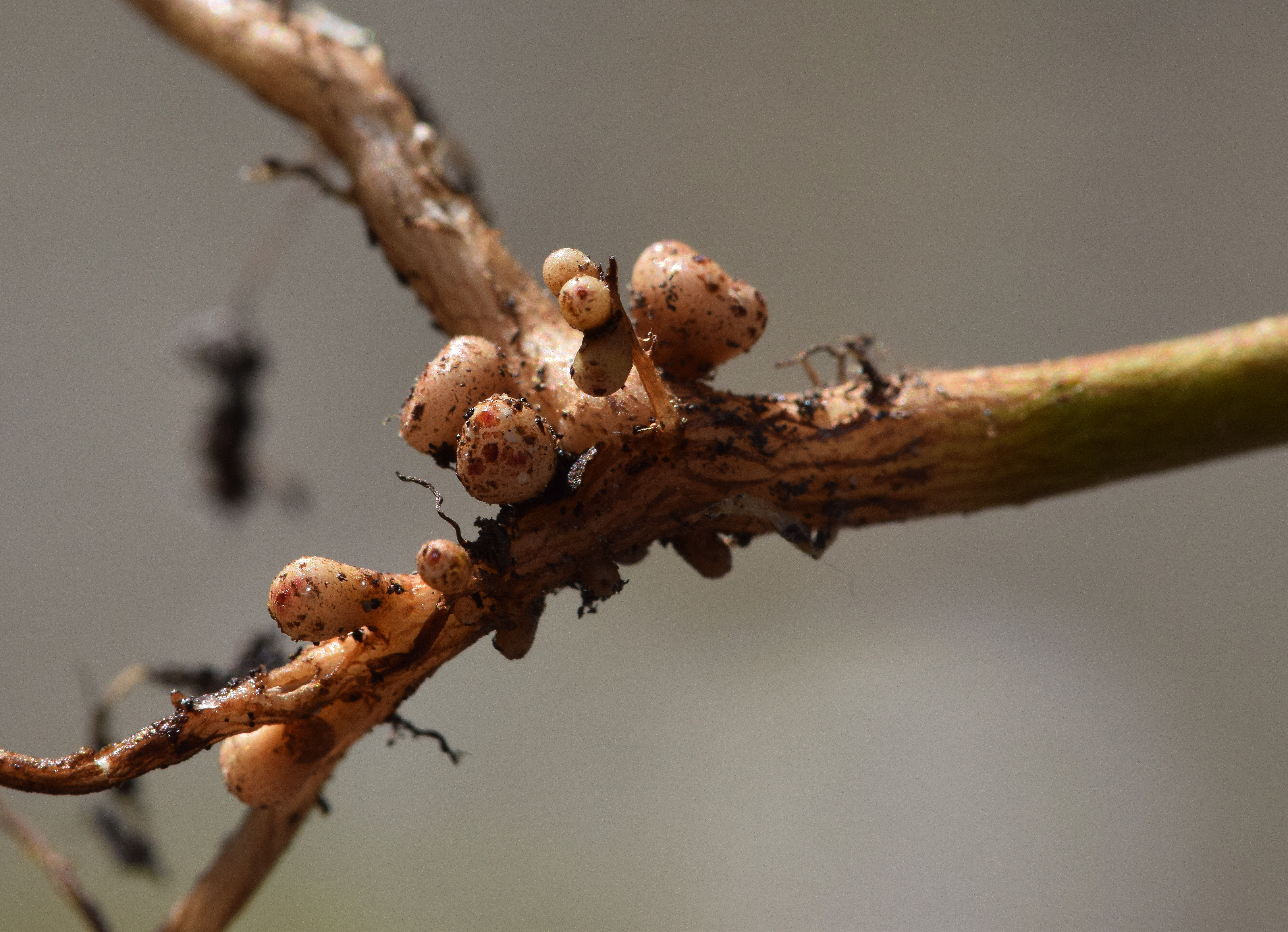 Frankia alni, een bacteriesoort die wortelknolletjes veroorzaakt op Zwarte els. Deze bacterie leeft in symbiose met de Zwarte els. De bacterie bindt stikstof en maakt deze beschikbaar voor zijn gastheer.